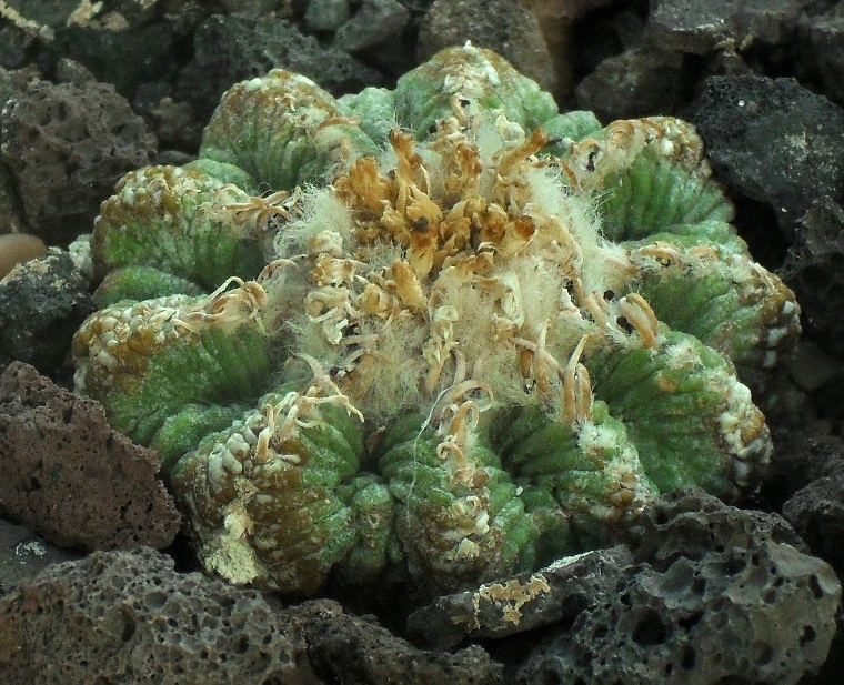 Aztekium ritteri - Botanischer Garten Leipzig